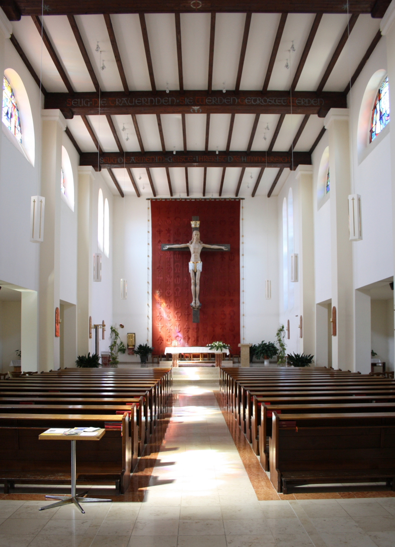 Die Innenansicht der Guntramsdorfer Pfarrkirche hl. Jakobus in Richtung Altar. Das Kruzifix stammt von Gustav Resatz.